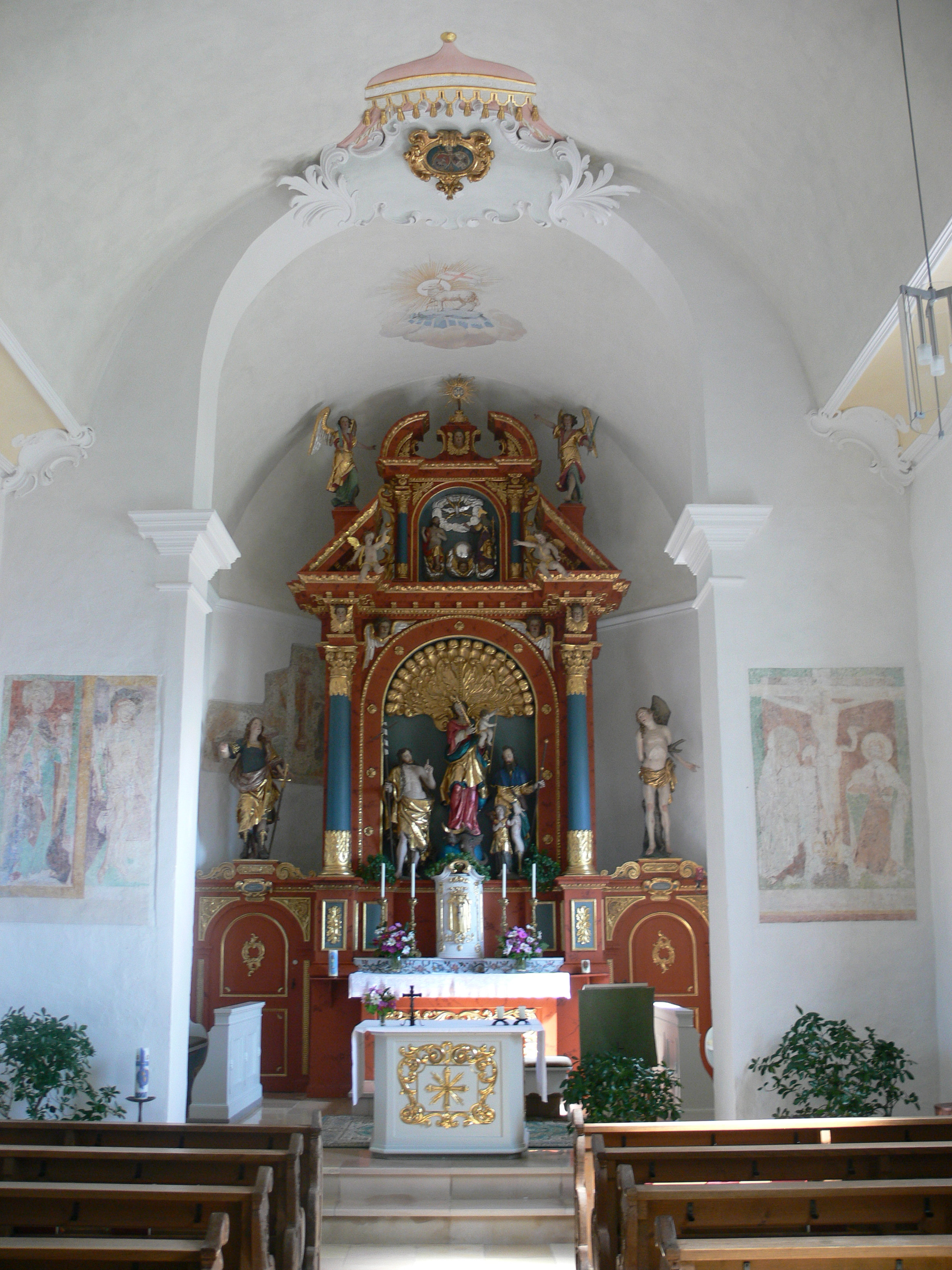 Filialkirche St. Johannes der Täufer, Ermengerst (Ortsteil von Wiggensbach) Frühbarocker Altar von 1680/1690